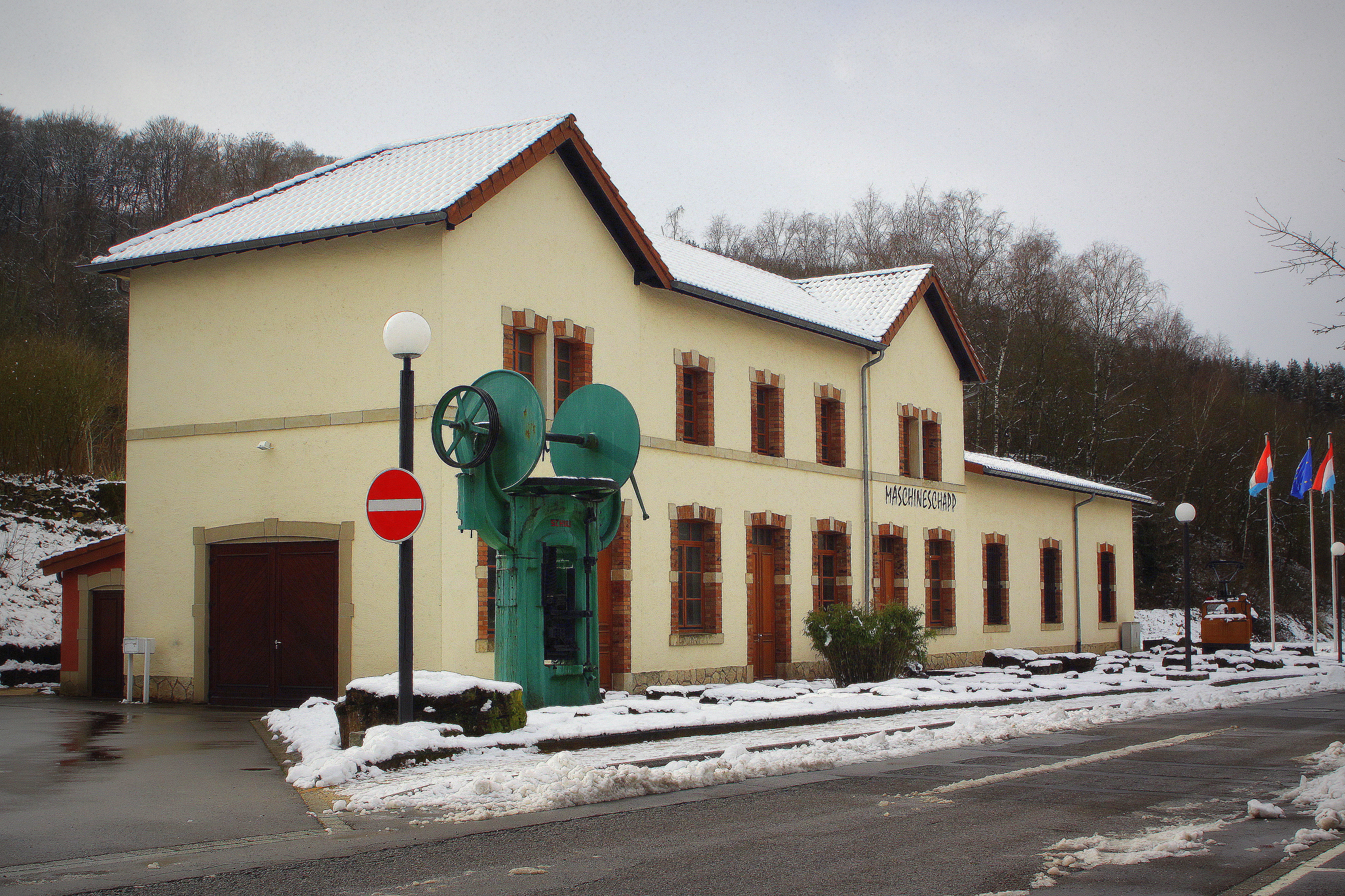 De fréieren Atelier vun der Minière